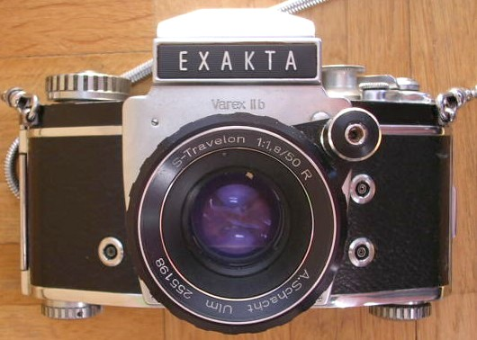 Exakta Varex IIb 1961